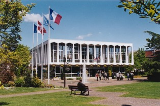 Hotel de ville de Meythet